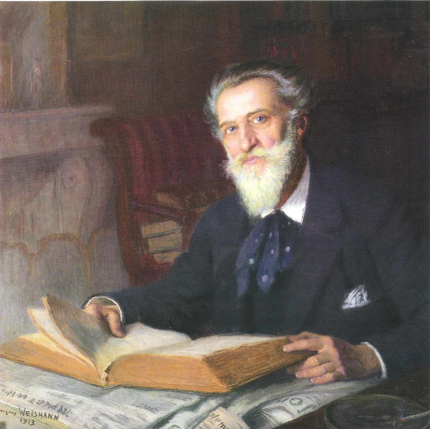 Gustave Rivet (1848-1936) député, sénateur de l'isère.